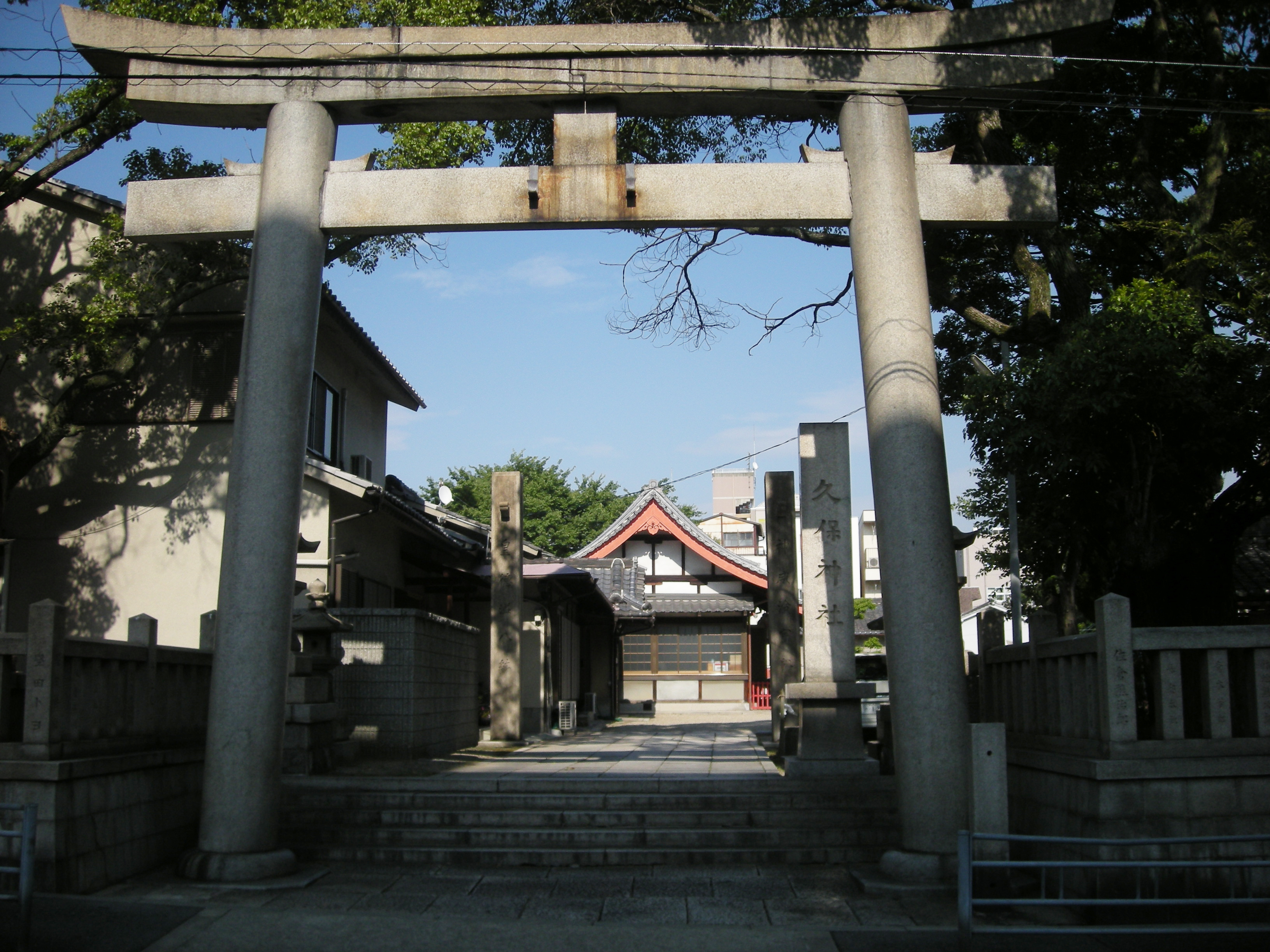 久保神社